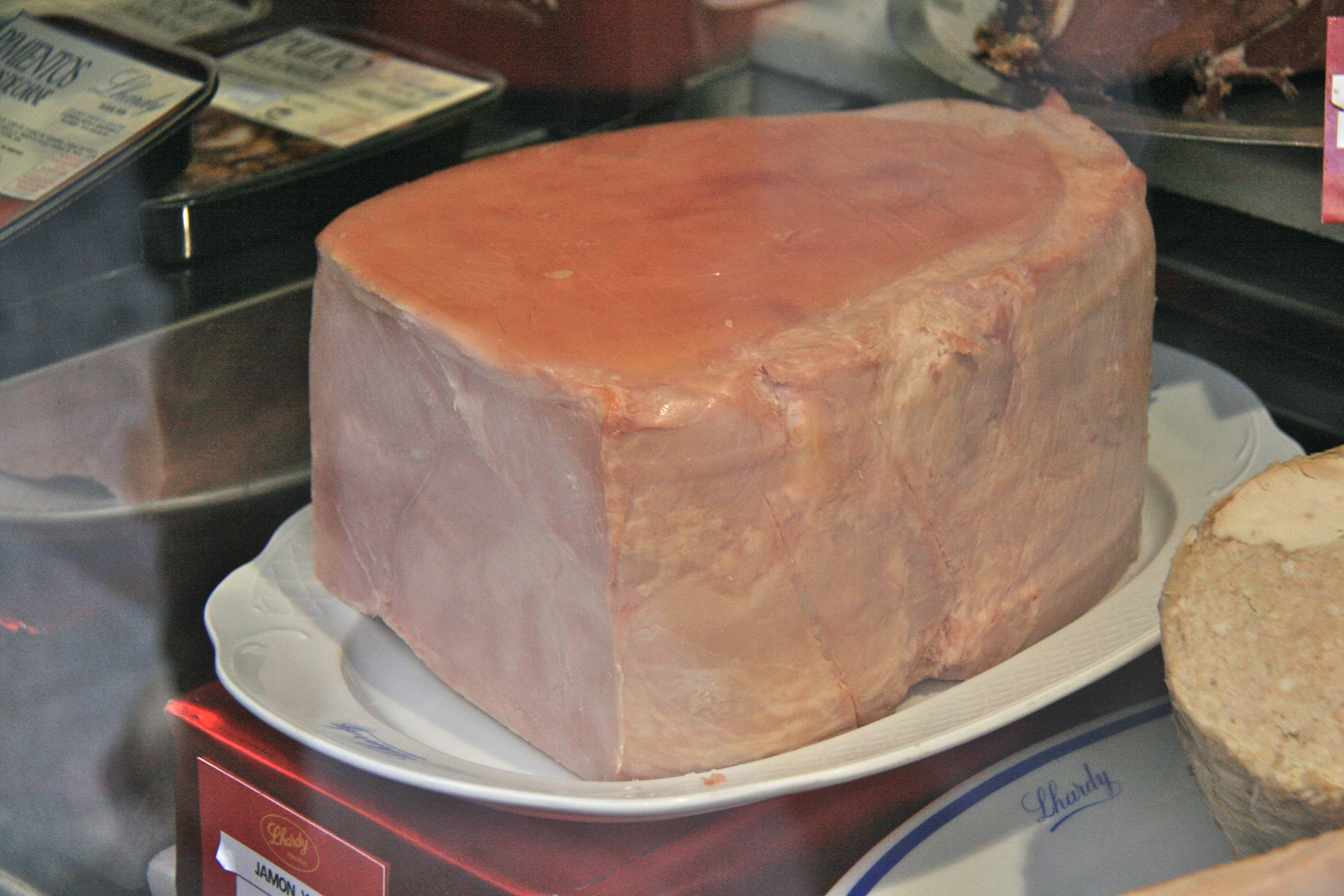 Jamón de York (Jamón Dulce)